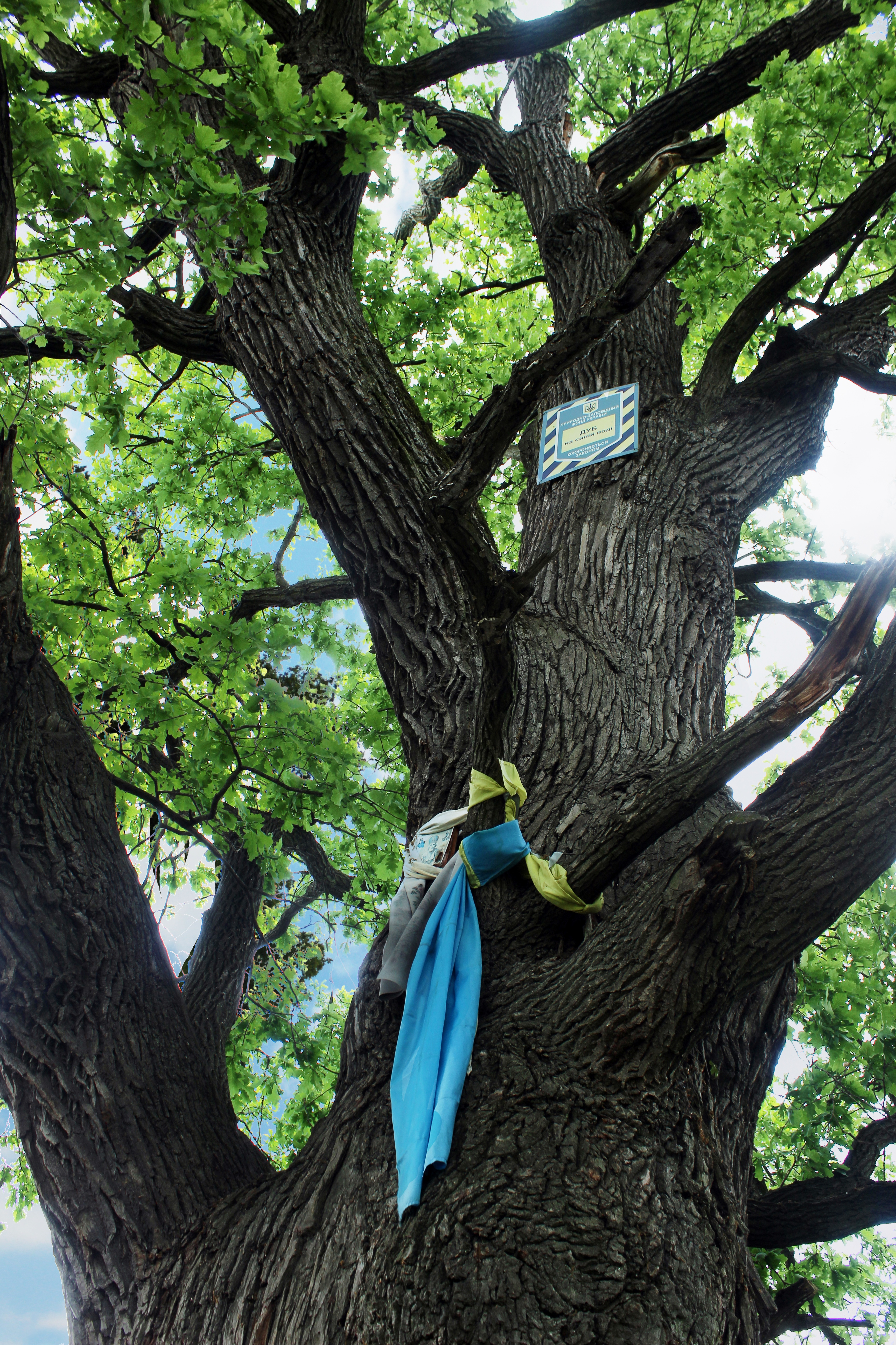 Дуб на синій воді, Голосіївський район, в межах ландшафтного заказника «Жуків острів». Найпівнічніша точка острова на р. Віта. Дорога з вул. Лісничої у напрямку комплексу відпочинку «Маячок». Не переходити дамбу, в кінці якої дуб "Знак оклику", а звернути вліво на грунтівку